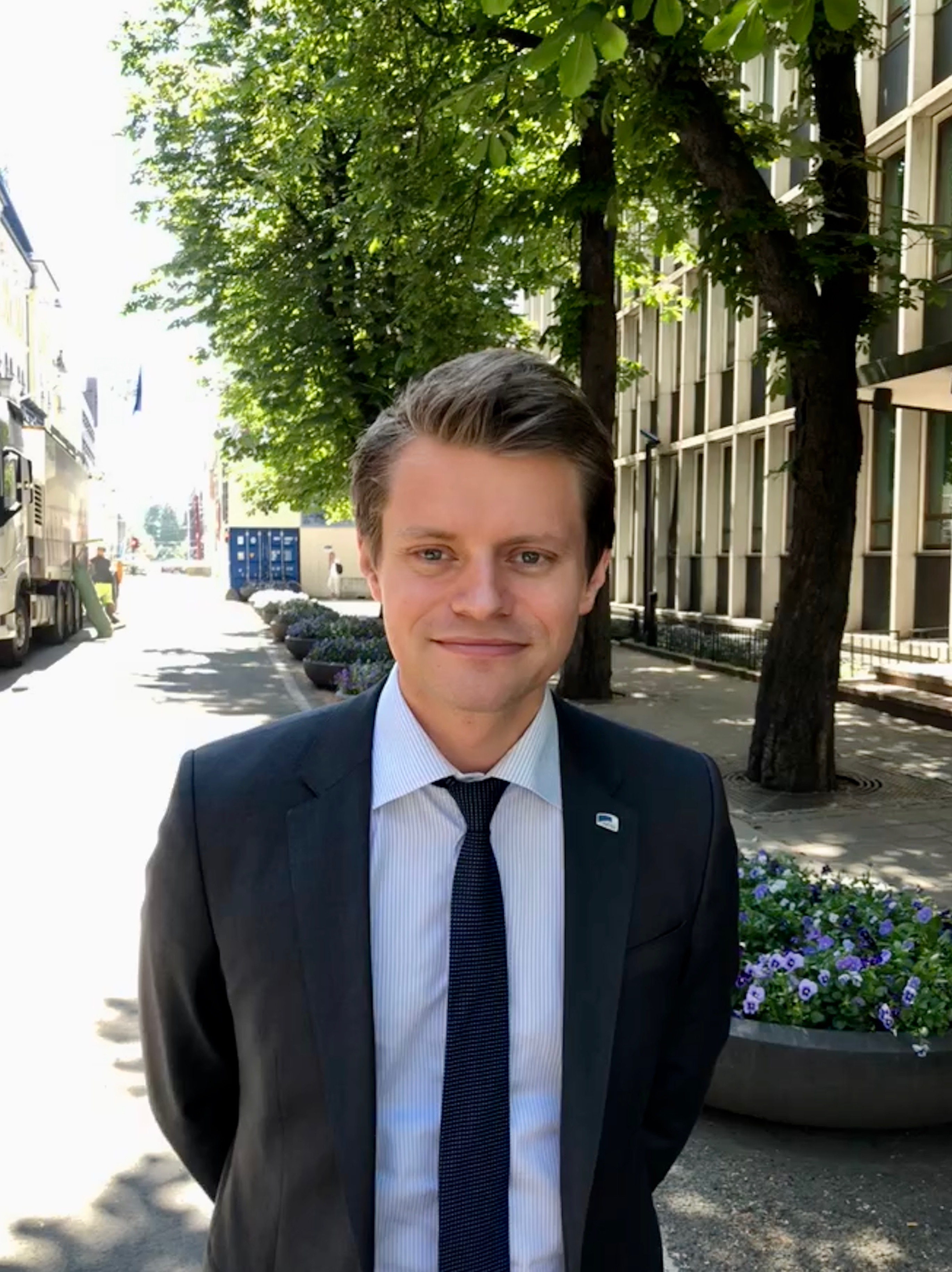 Peter Frølich, Høyre-politiker.